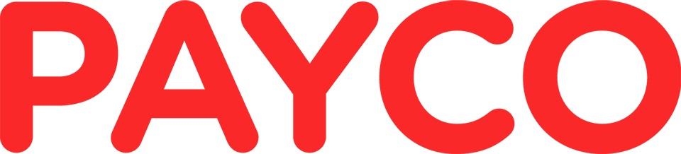 페이코 BI